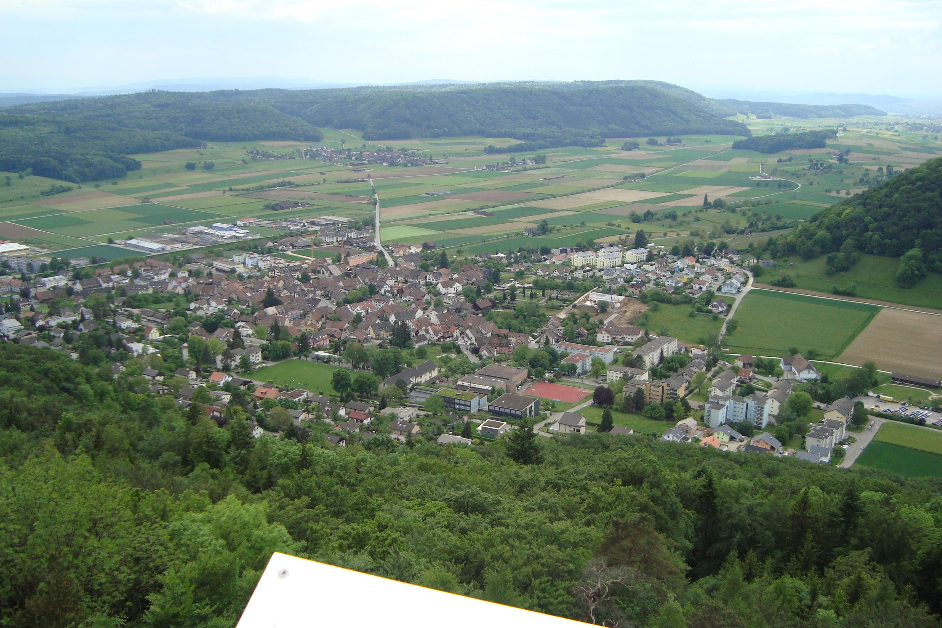 Luftaufnahme von Beringen SH